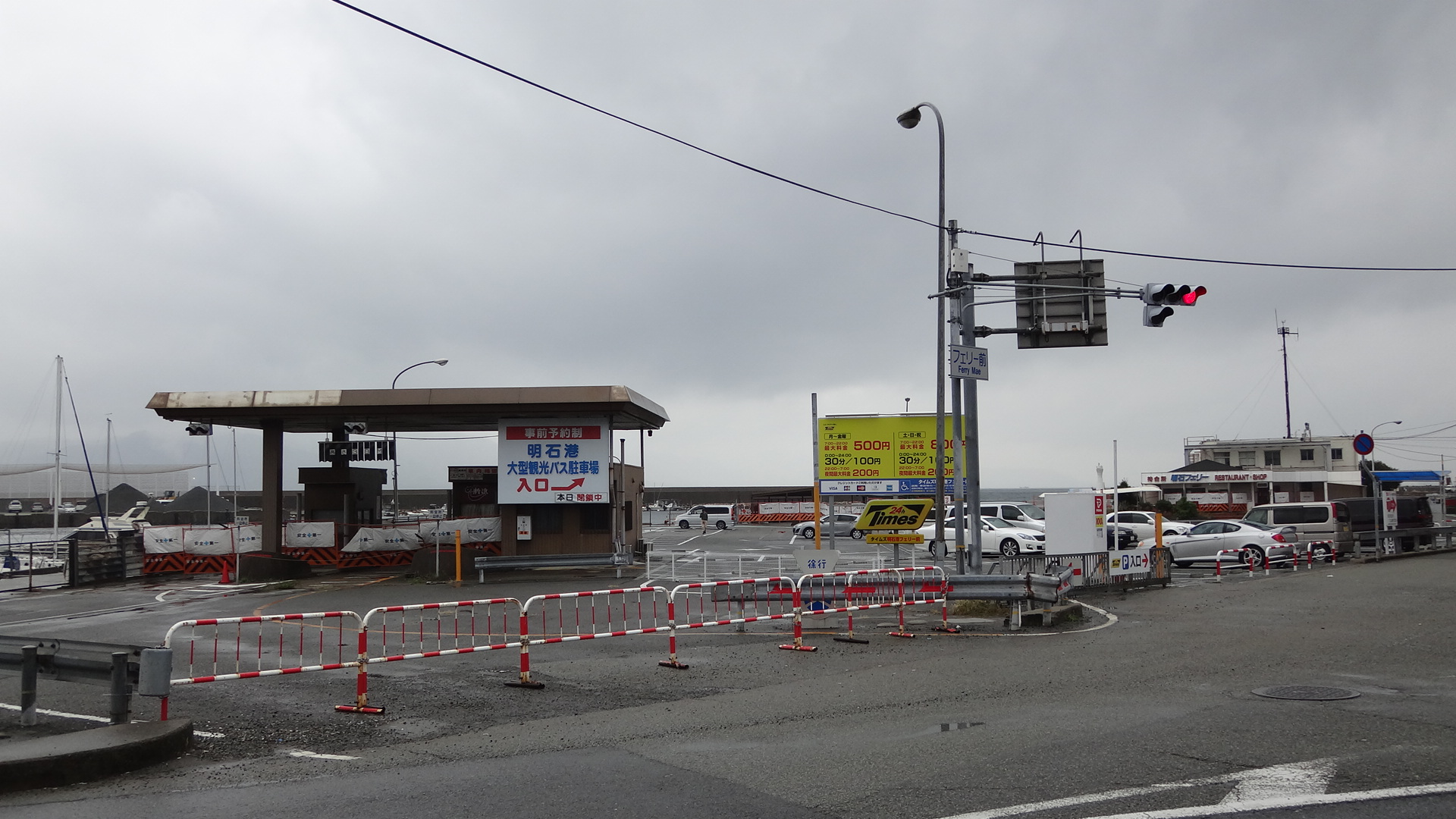 明石淡路フェリー・明石港の待機場は現在、駐車場として利用されている。 （2012年10月）